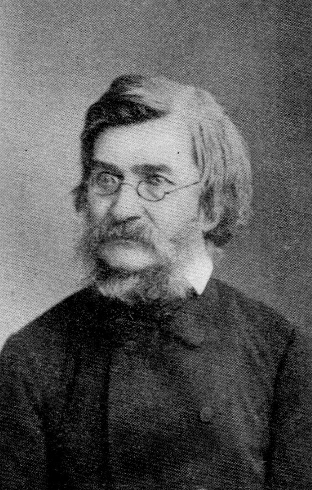 Julius Zacher (1816—1887), German philologist